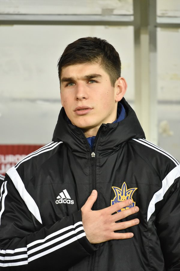 Руслан Маліновський - український футболіст